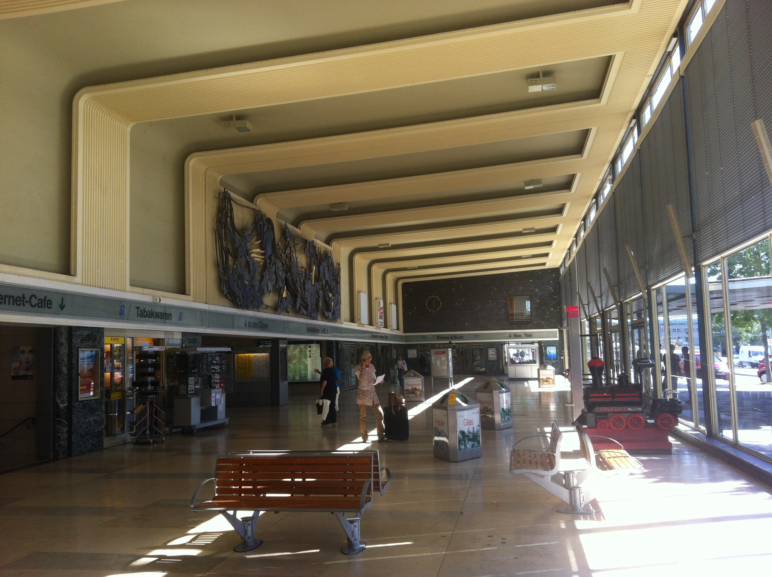 Empfangshalle Pforzheimer Hbf